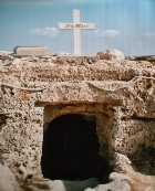 Die Katakomben der heiligen Thekla bei Agia Napa